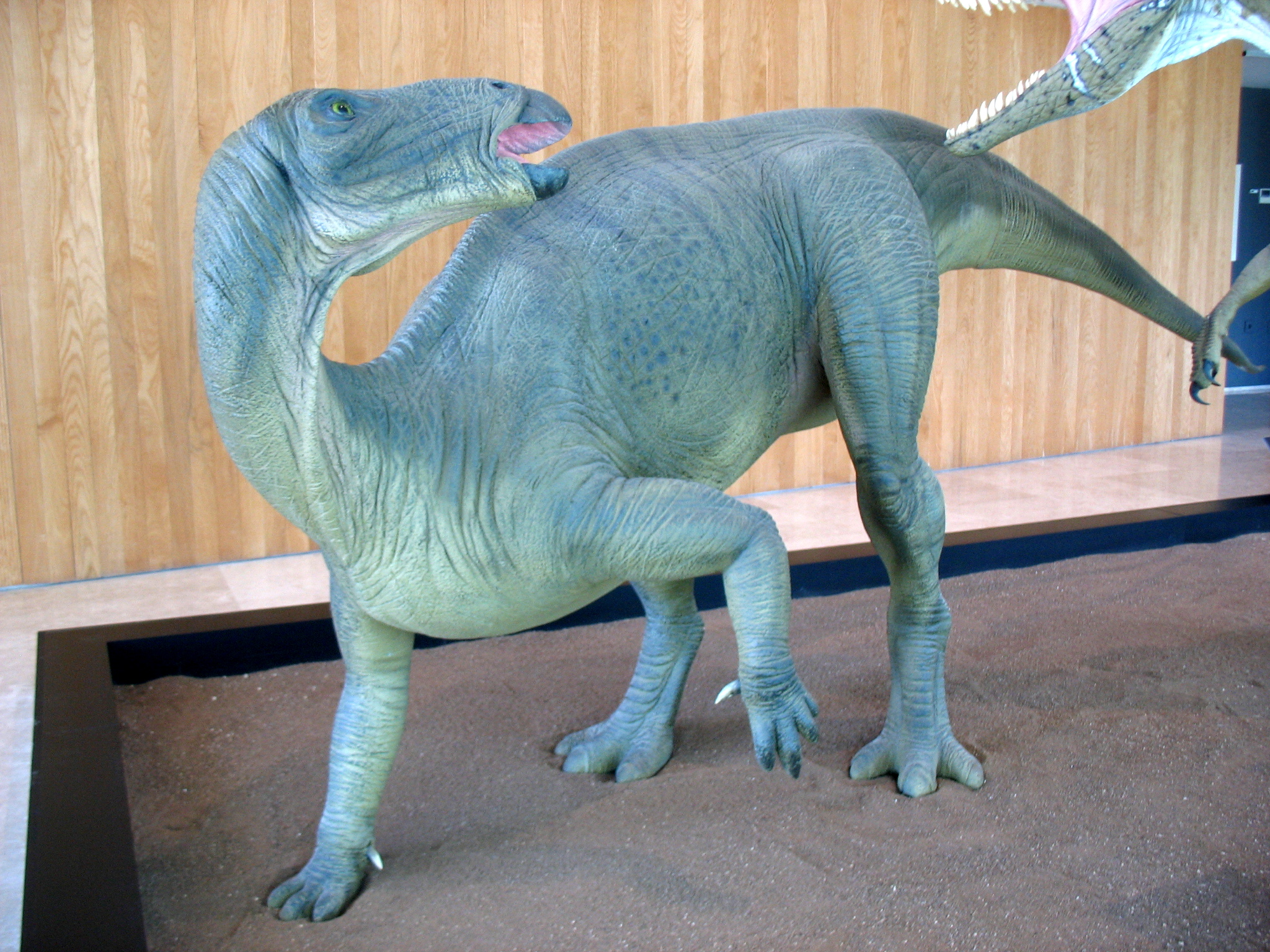 Figura de Mantellisaurus. Museo Paleontológico de Castilla-La Mancha (Cuenca, España)